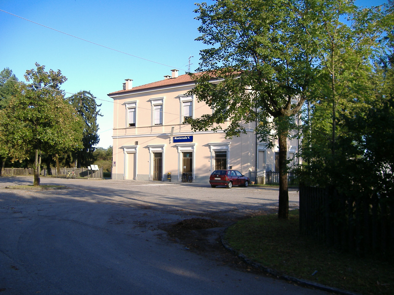 Stazione di Montereale Valcellina